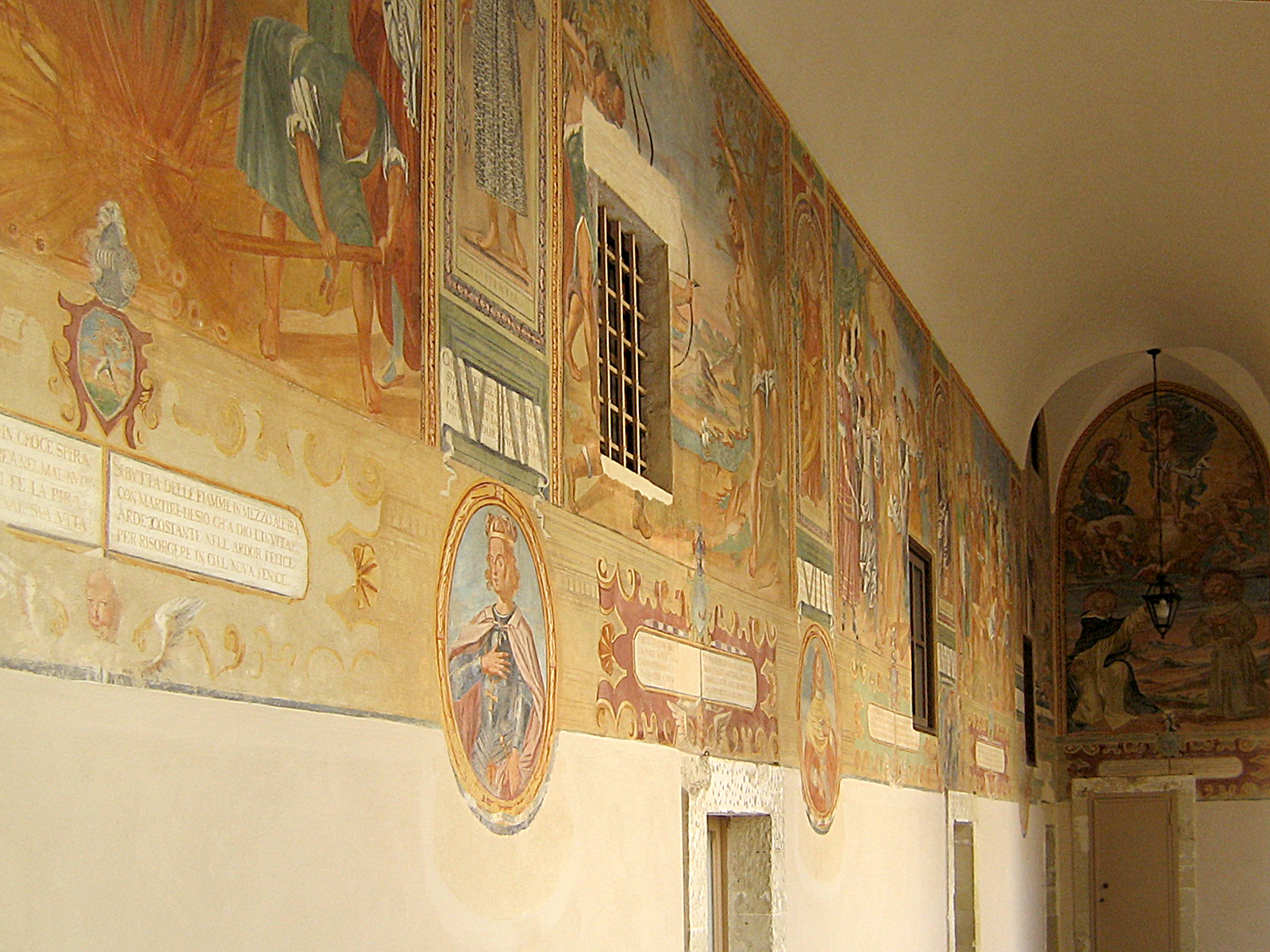 Chiostro Chiesa di Santa Caterina Galatina